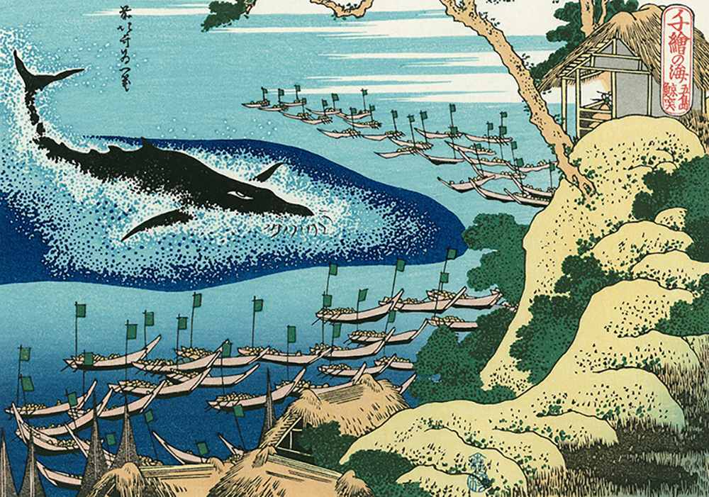 a photo image of Hokusai's Goto Kujira Tsuki (千絵の海 五島鯨突)